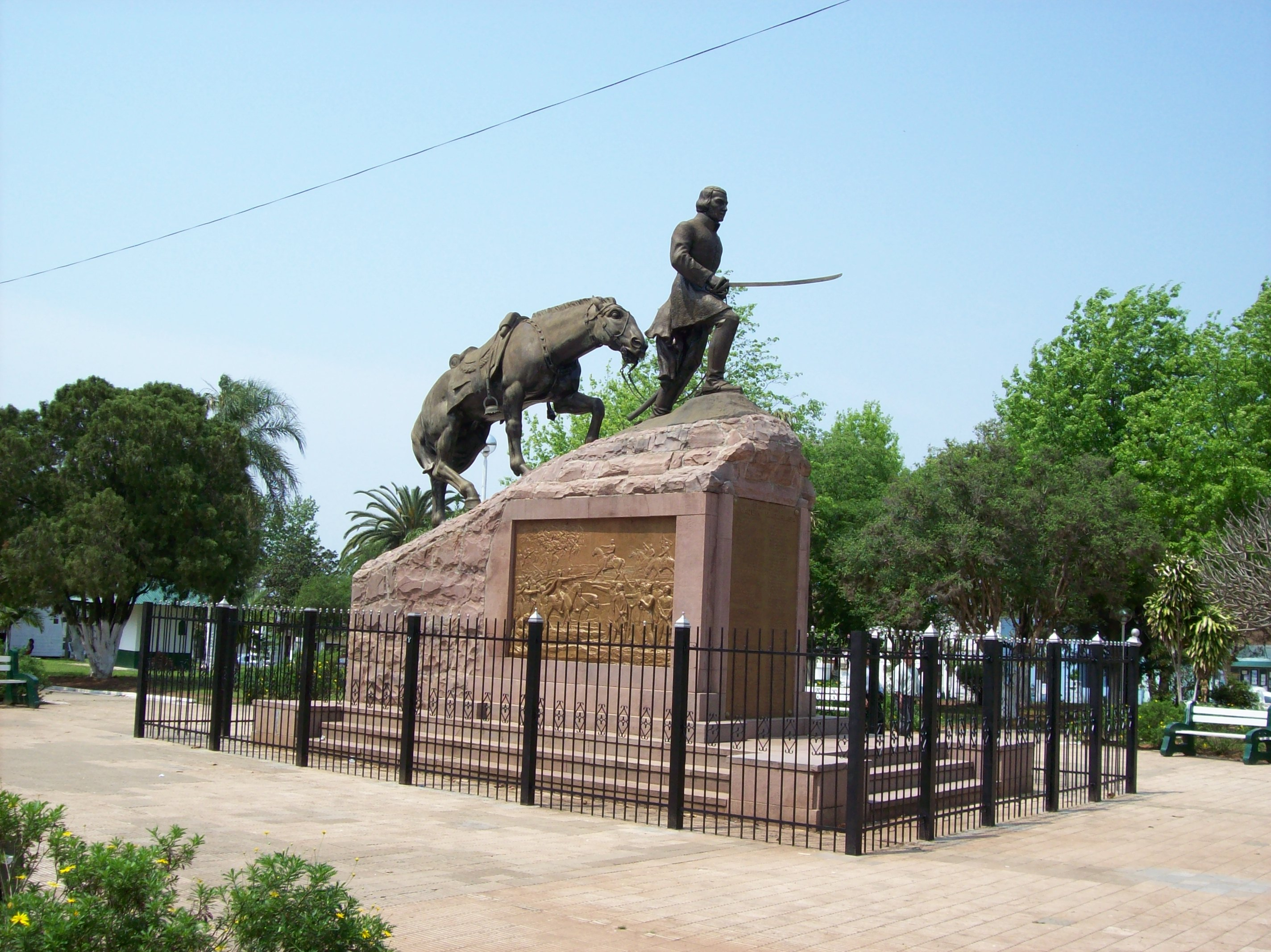 Monumento al General Joaquín Madariaga y sus 108 valientes en la Plaza Independencia, Paso de los Libres, Corrientes, Argentina